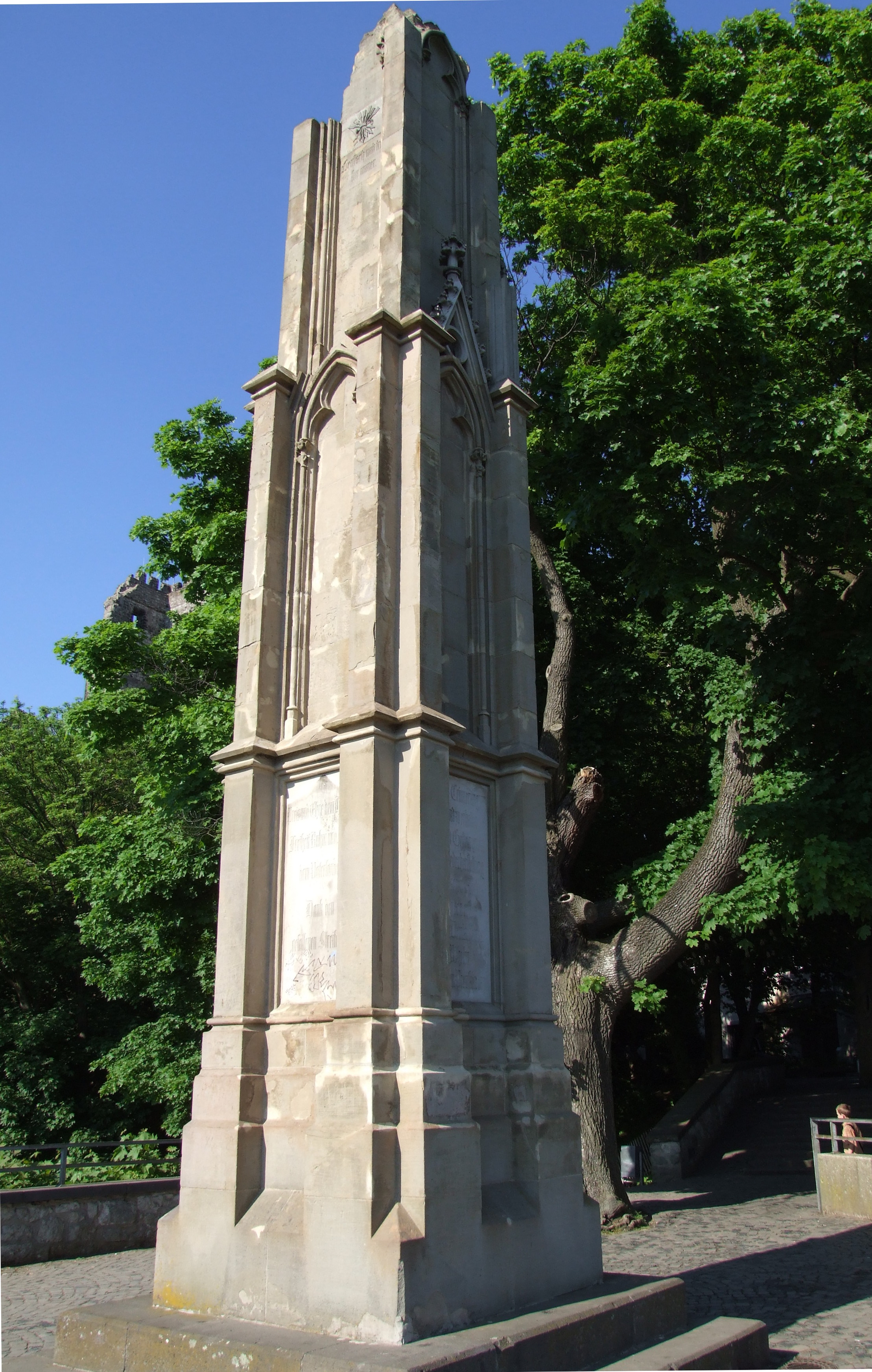 Obelisk (Landsturmdenkmal) auf der Terrasse auf dem Drachenfels